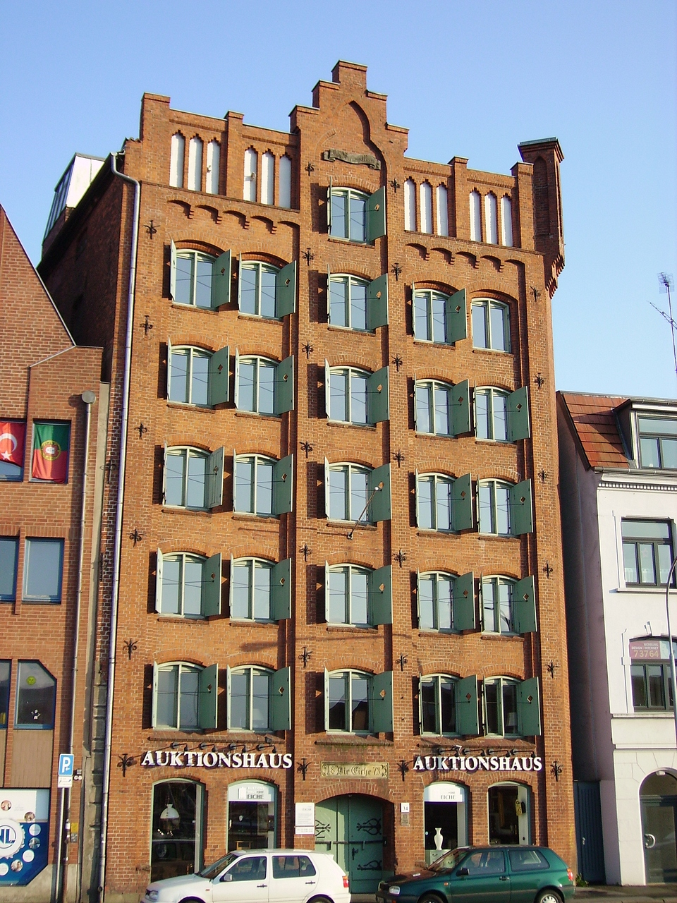 Ein Auktionshaus in Lübeck in einem ehemaligen Speicher, ehemals im Besitz der Familie Mann